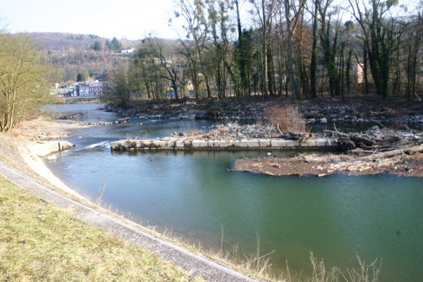 Den Deich vum Schleisekanal zu Tilff.